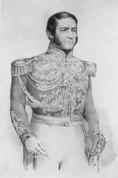 Карл фон Бираго (1792-1845)